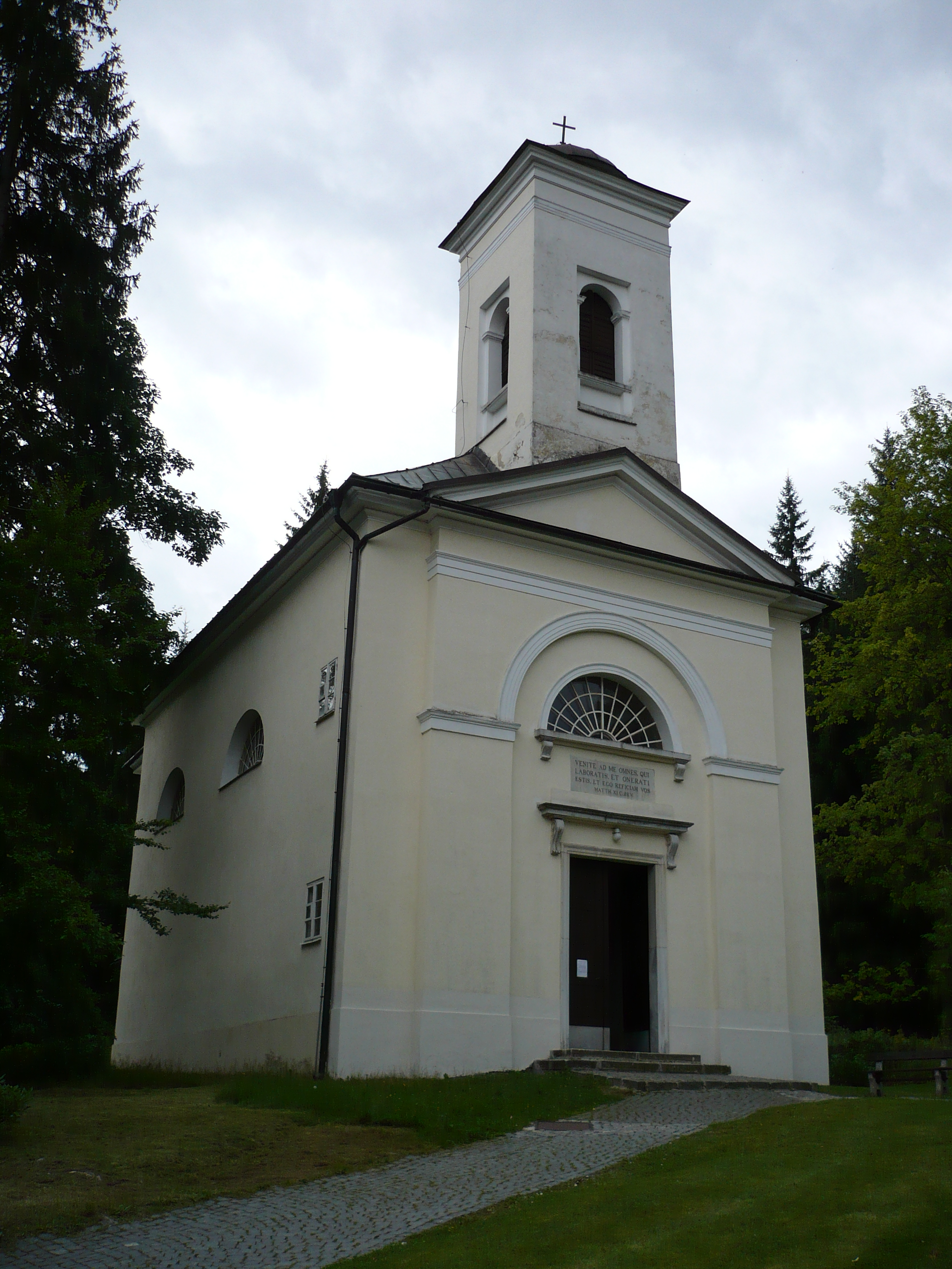 kostel Panny Marie Uzdravení nemocných v Karlově Studánce